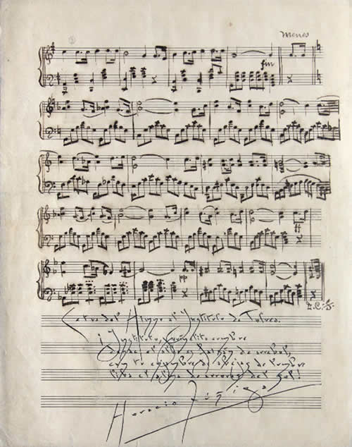 Himno de la Universidad Autónoma del Estado de México